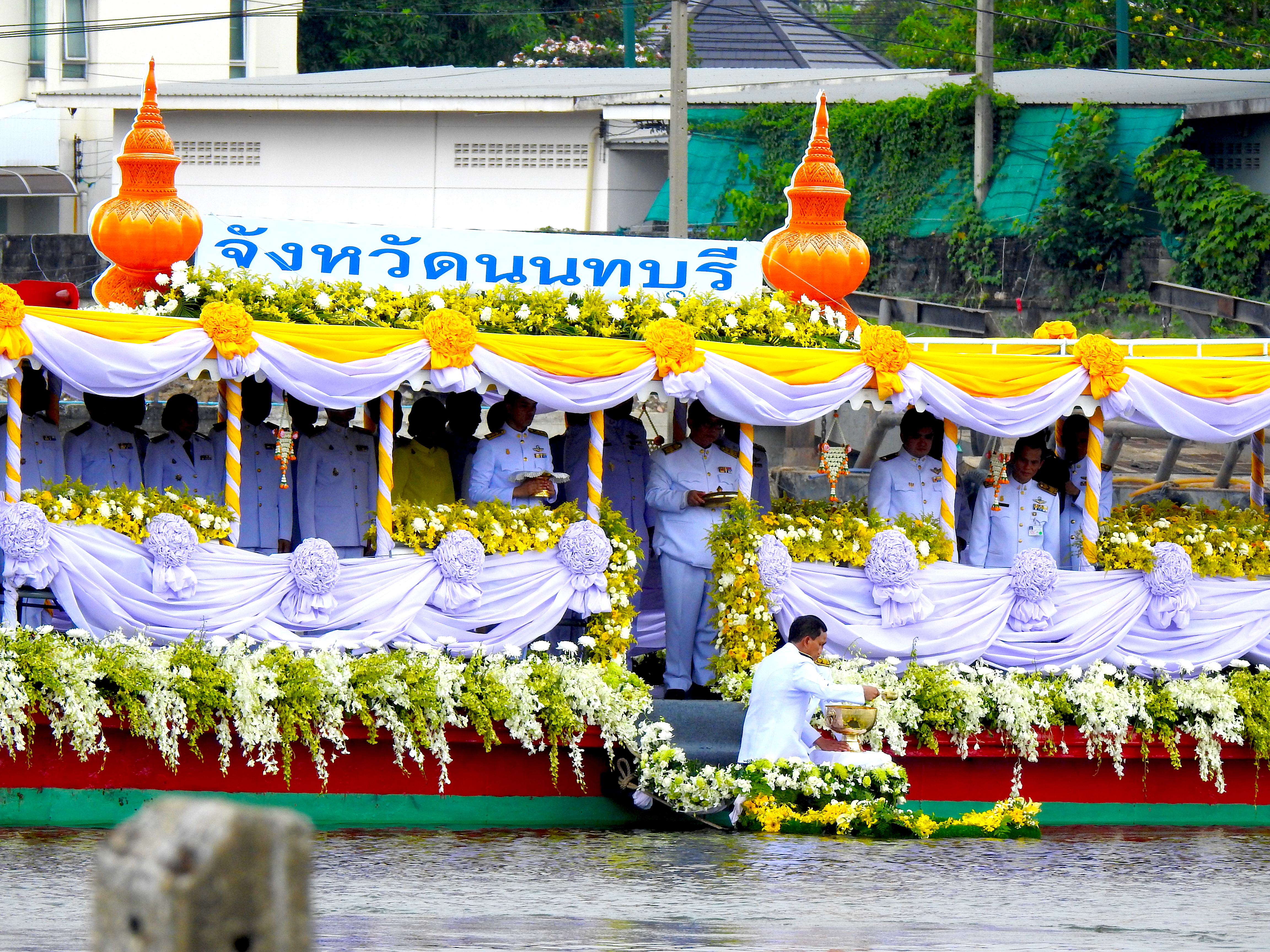 ผู้ว่าราชการจังหวัดนนทบุรีตักน้ำจากแหล่งน้ำศักดิ์สิทธิ์ใส่ขันน้ำสาคร